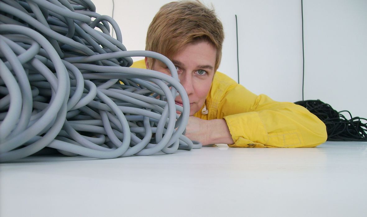 Dieses Bild zeigt die Künstlerin Judith.P.Fischer mit einer ihrer Arbeiten